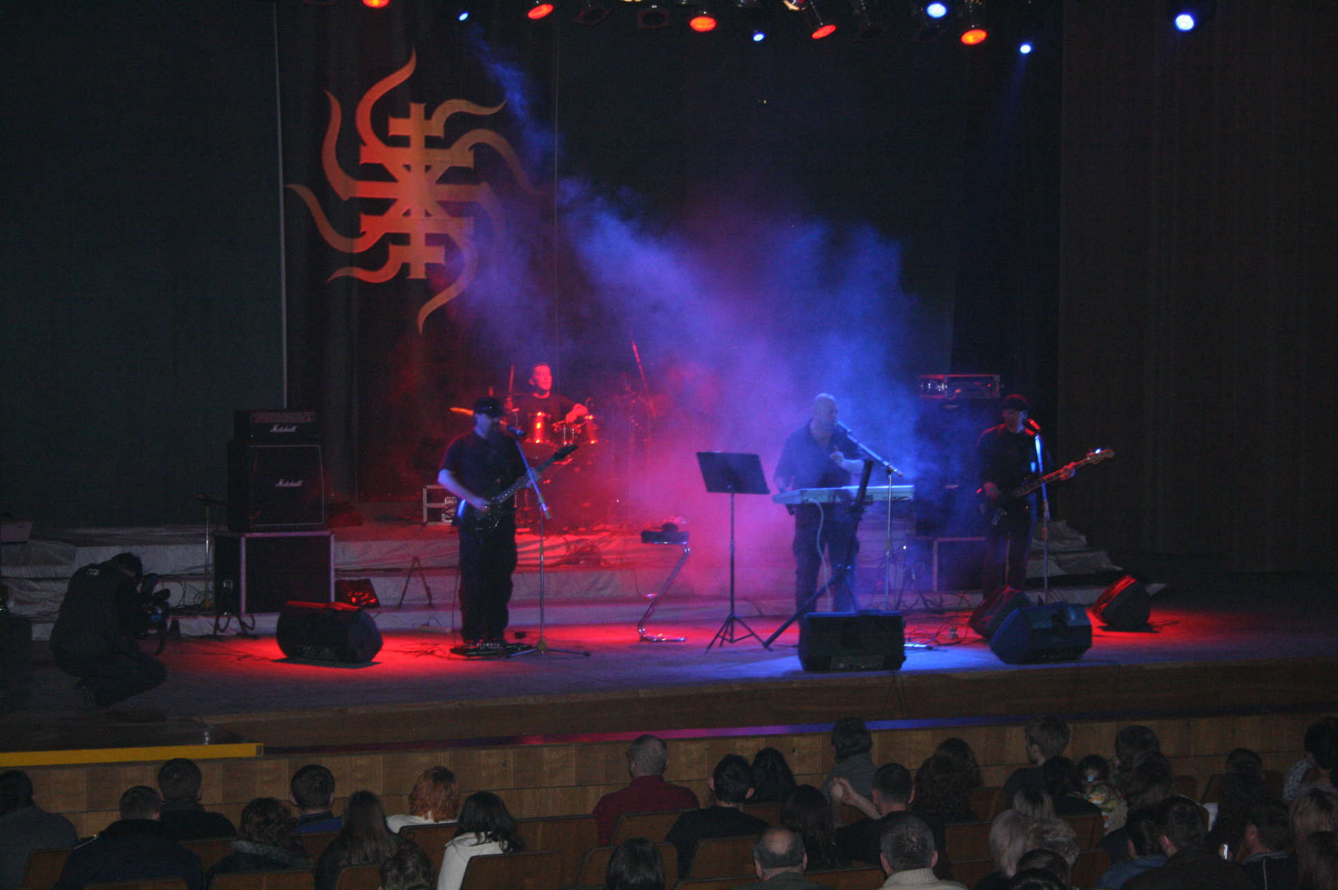 Komu Vnyz w Tarnopolu 2007